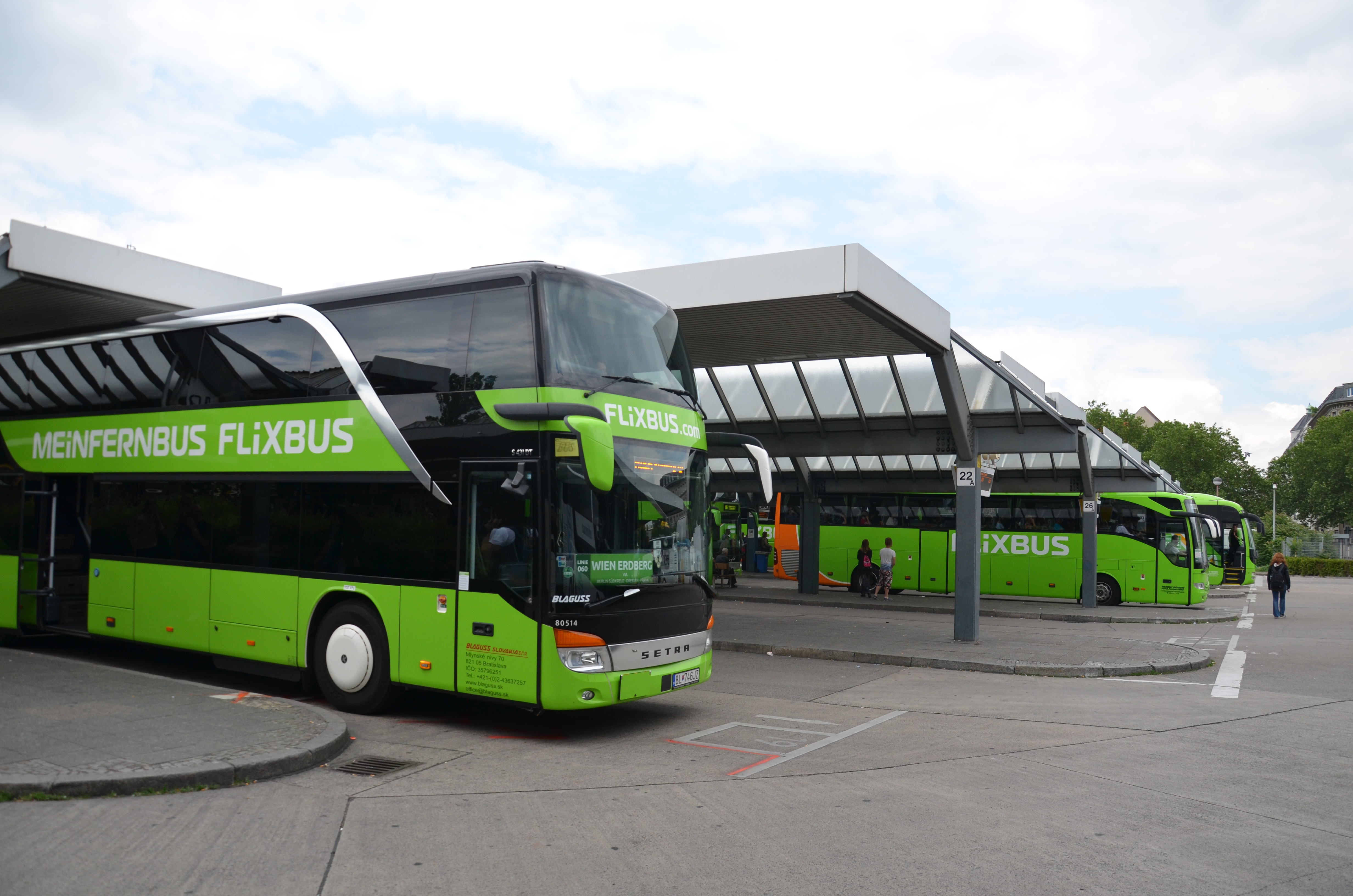 Vue sur les quais de Flixbus en gare routière de Berlin Messe (ZOB).